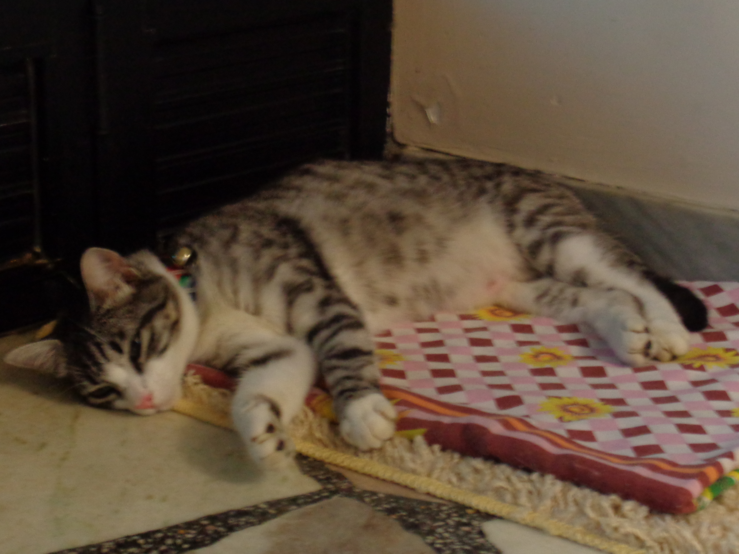 Frida dormindo